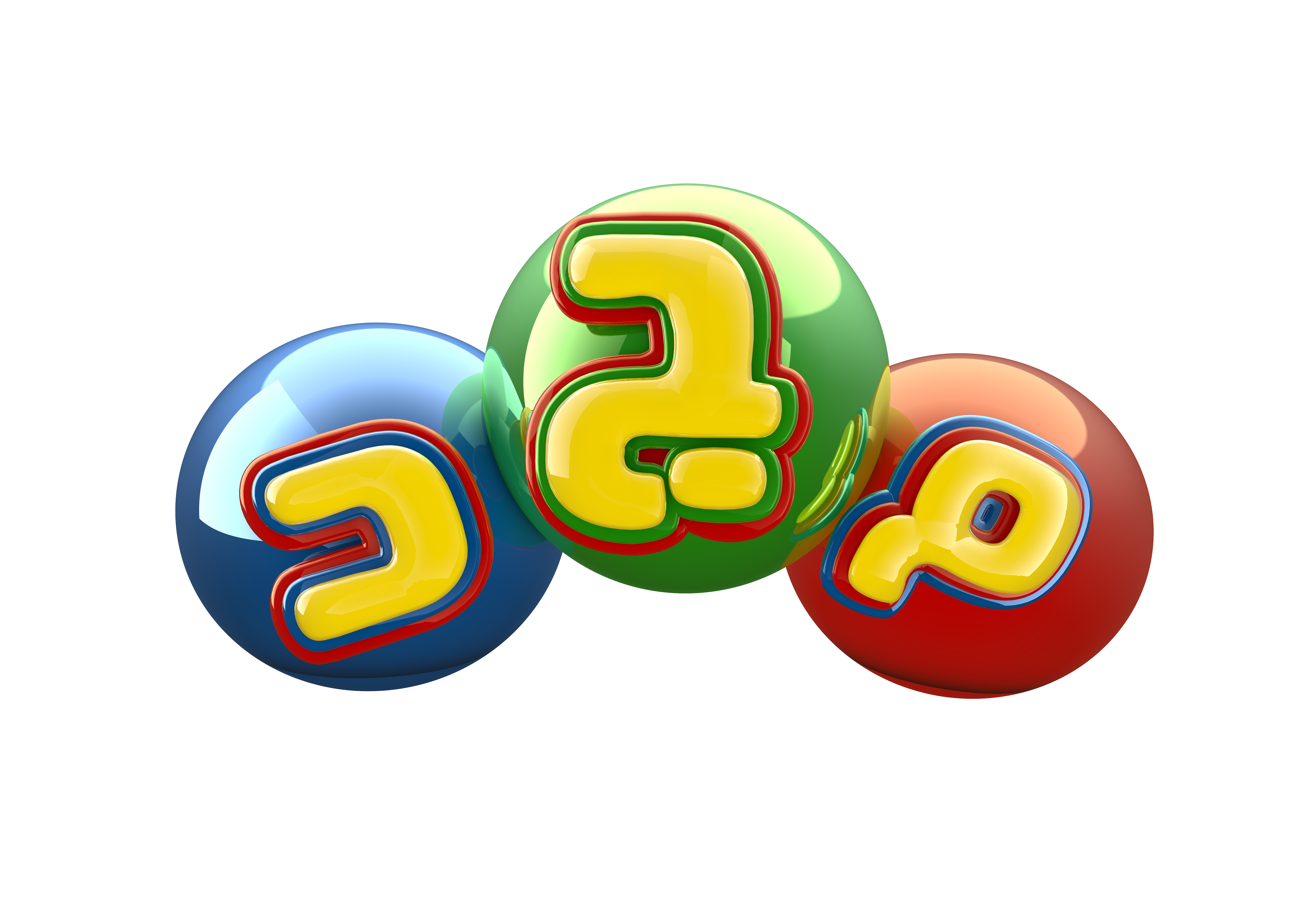 شعار مجد